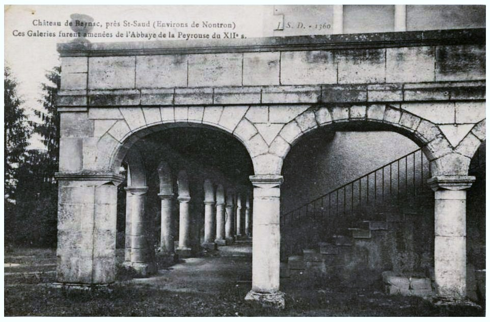 Château de Beynac. 24470 Saint-Saud-Lacoussière (France). Galerie provenant de l'abbaye de la Peyrouse.